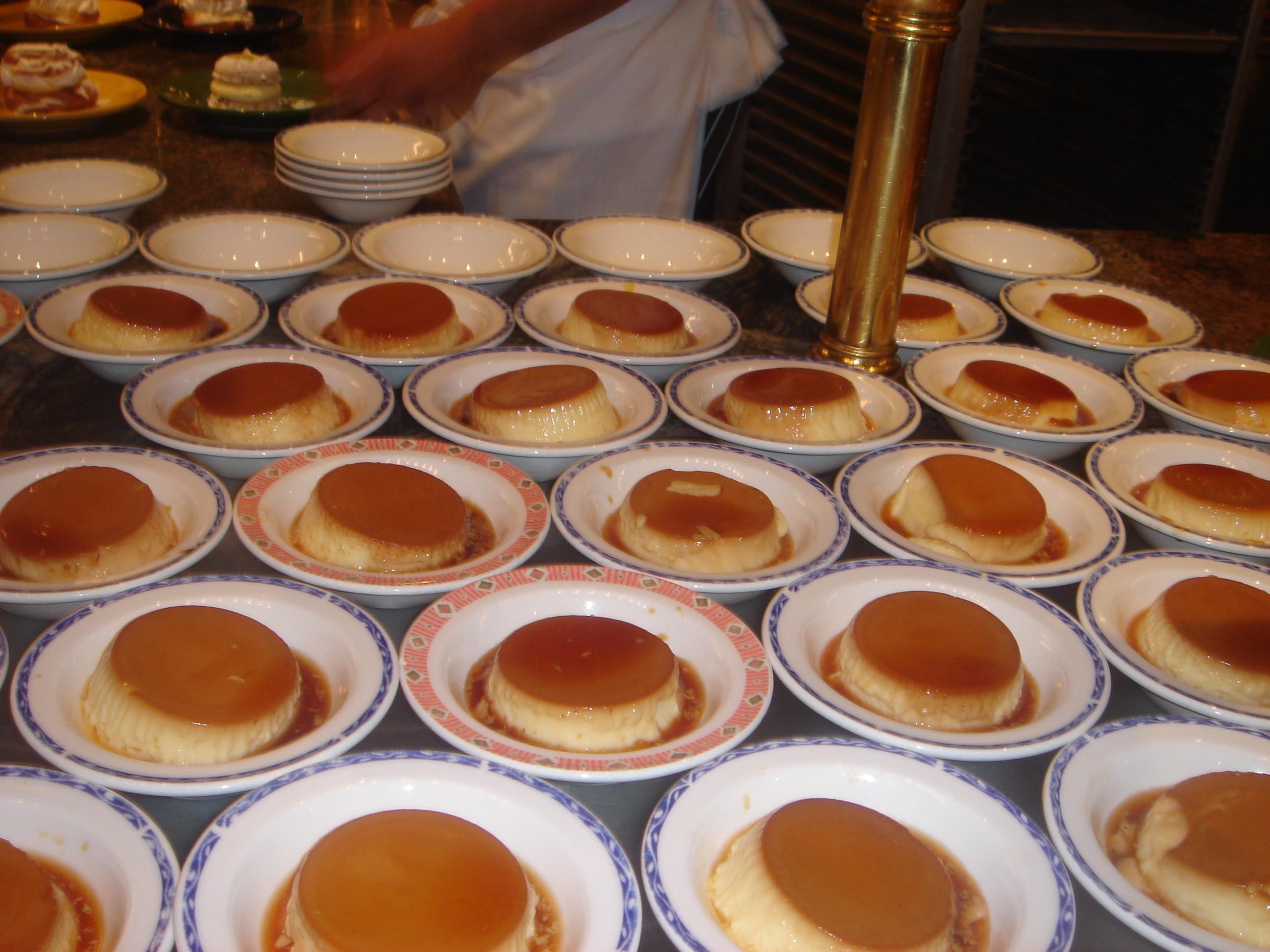 camarão